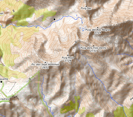 carte réalisée sur umap This map may be incomplete, and may contain errors. Don't rely solely on it for navigation.